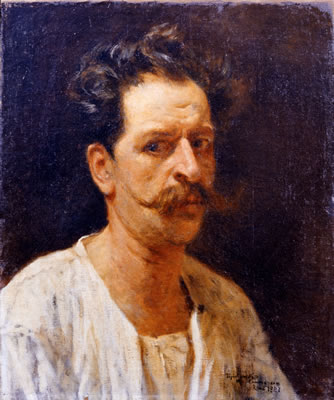 Self-portrait